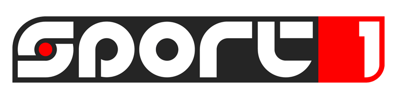 sport tv